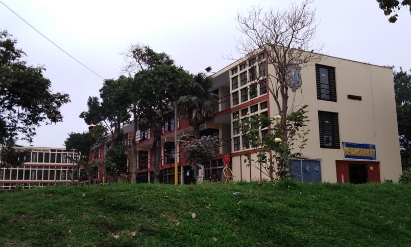 UNMSM Residencia Universitaria 2019 - Vista lateral